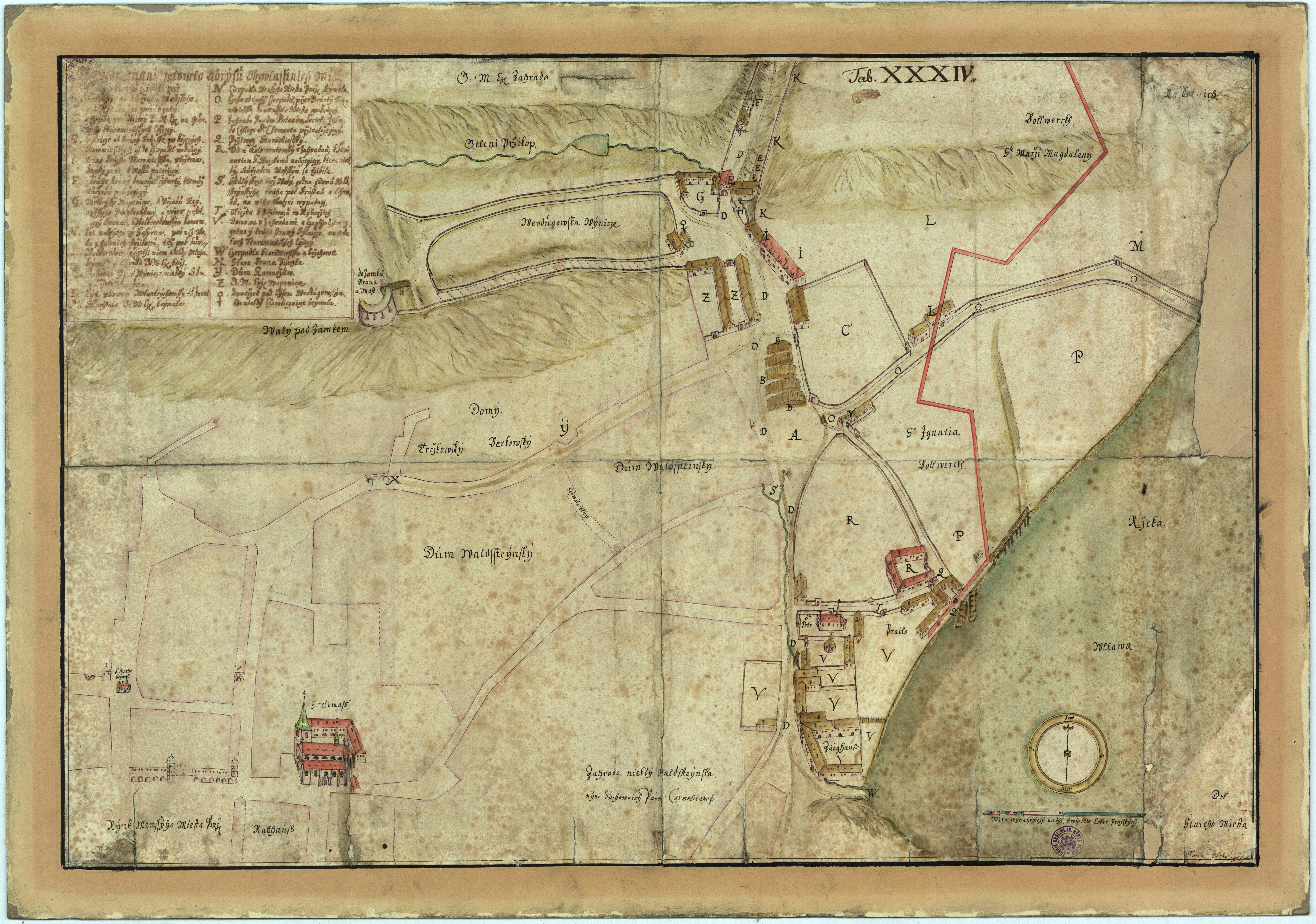 Plán části Malé Strany od Samuela Globice, který zachycuje mimo jiné zaniklou osadu Písek (též Rybáře) tj. přibližně dnešní Klárov. Podle označení Tab XXXIV se lze domnívat, že jde o jediný dochovaný list většího plánu Prahy.